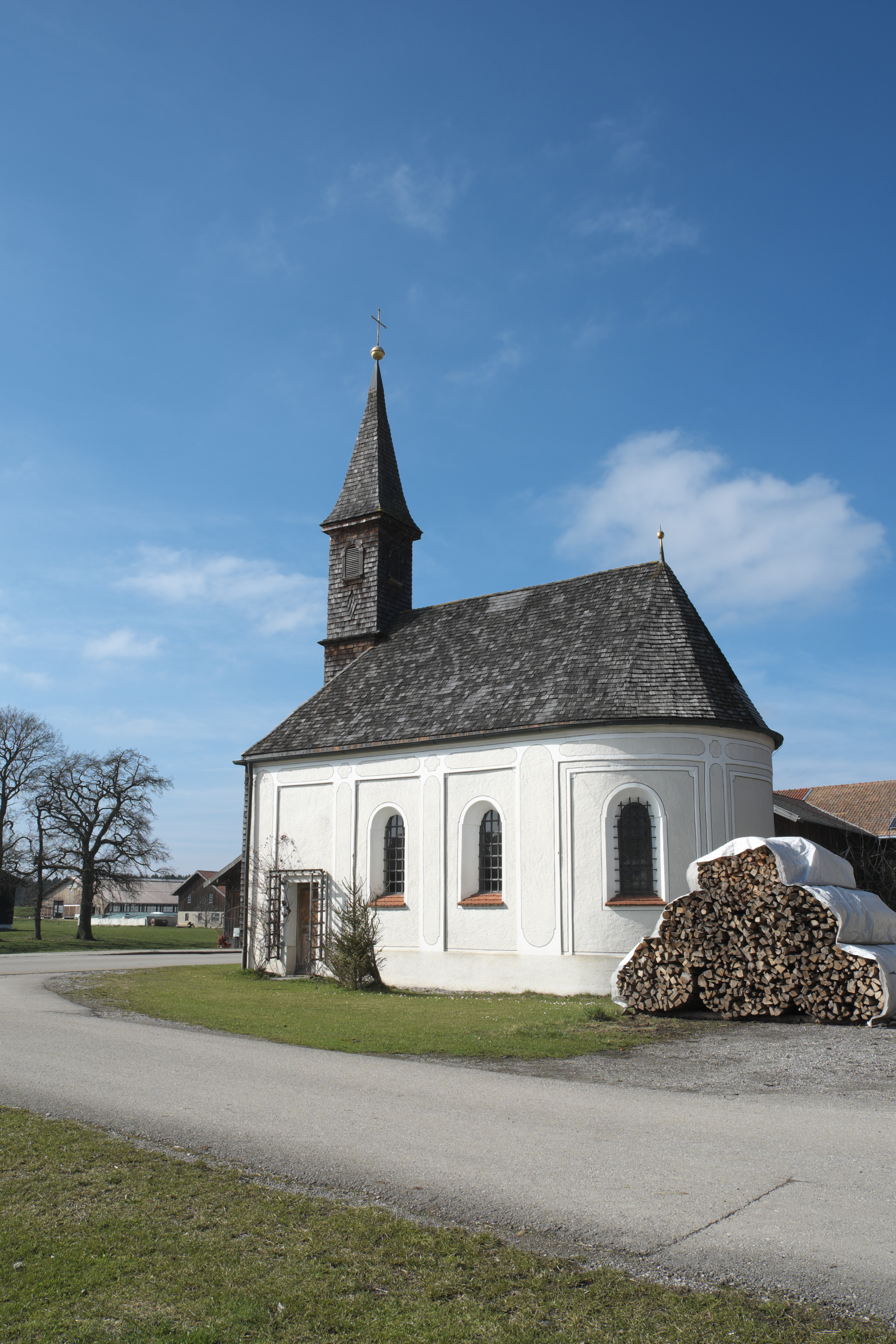 Katholische Kapelle St. Rochus und St. Sebastian in Sollach (Valley) im Landkreis Miesbach (Bayern/Deutschland)